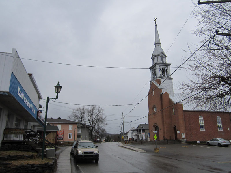 Église de Sainte-Béatrix